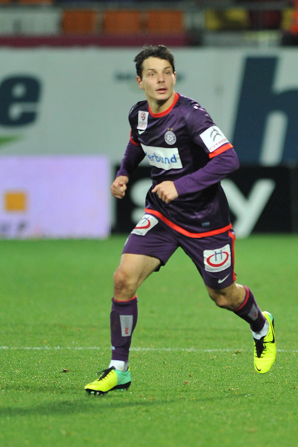 Bundesliga:FK Austria Wien - RZ Pellets WAC Philipp Hosiner